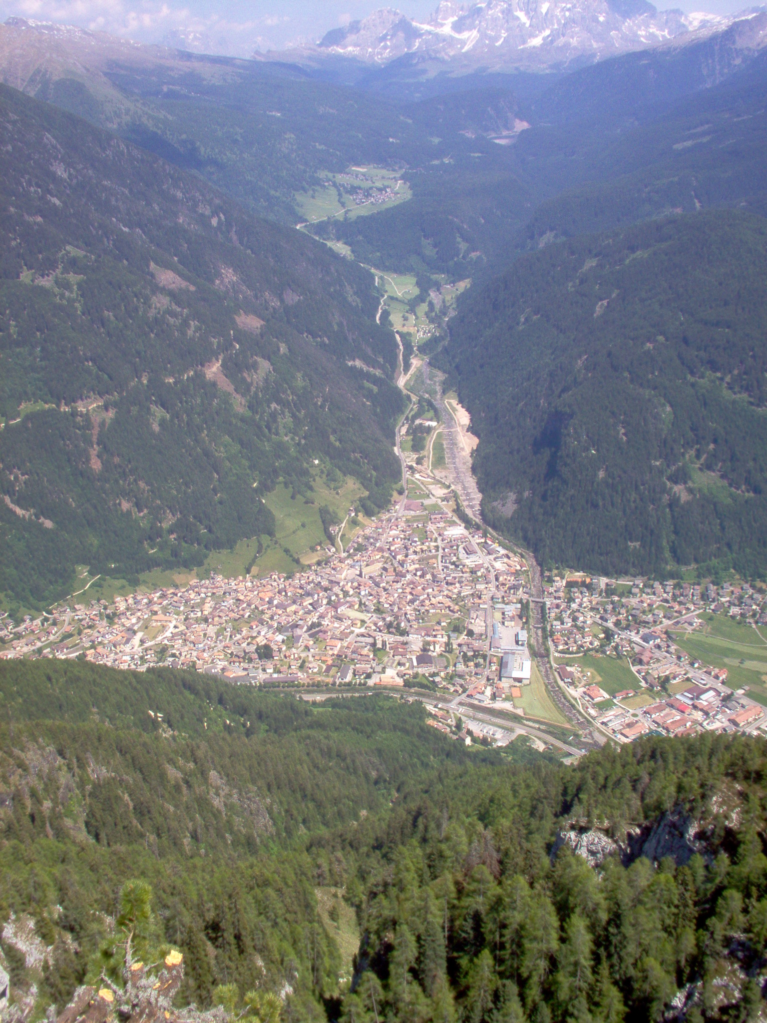 General view of Predazzo, province of Trento - Copyright (c) 2006 Giacomo Zorzi